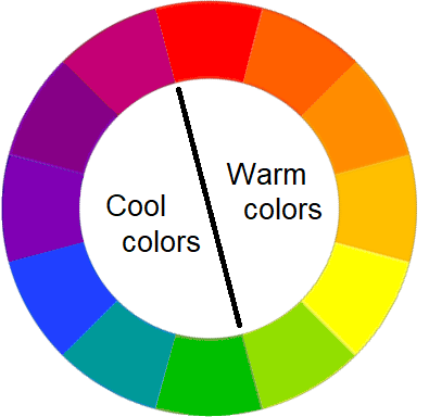 Colores cálidos y fríos representados en una rueda de colores o círculo cromático tradicional.